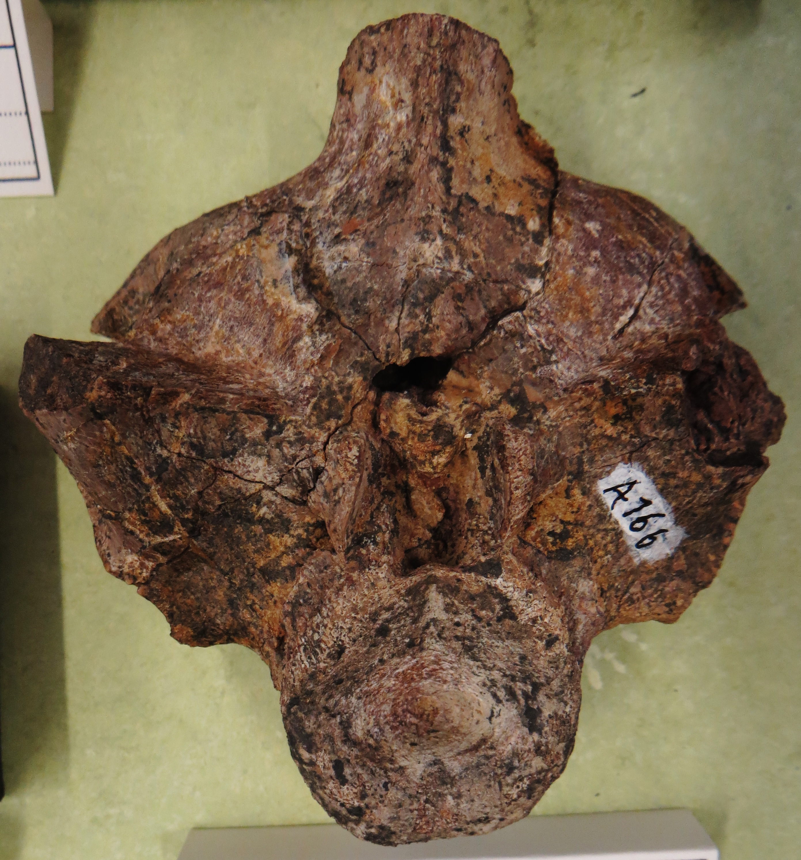 Fossil of Diadectes - Took the picture at Natural History Museum, Bonn University